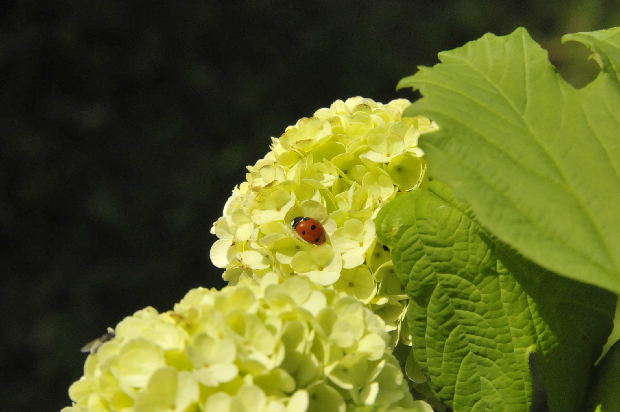 Schneeballblüte mit Marienkäfer